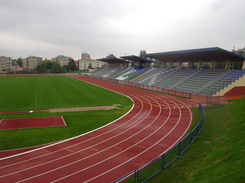 Stadion miejski Mosir Ełk